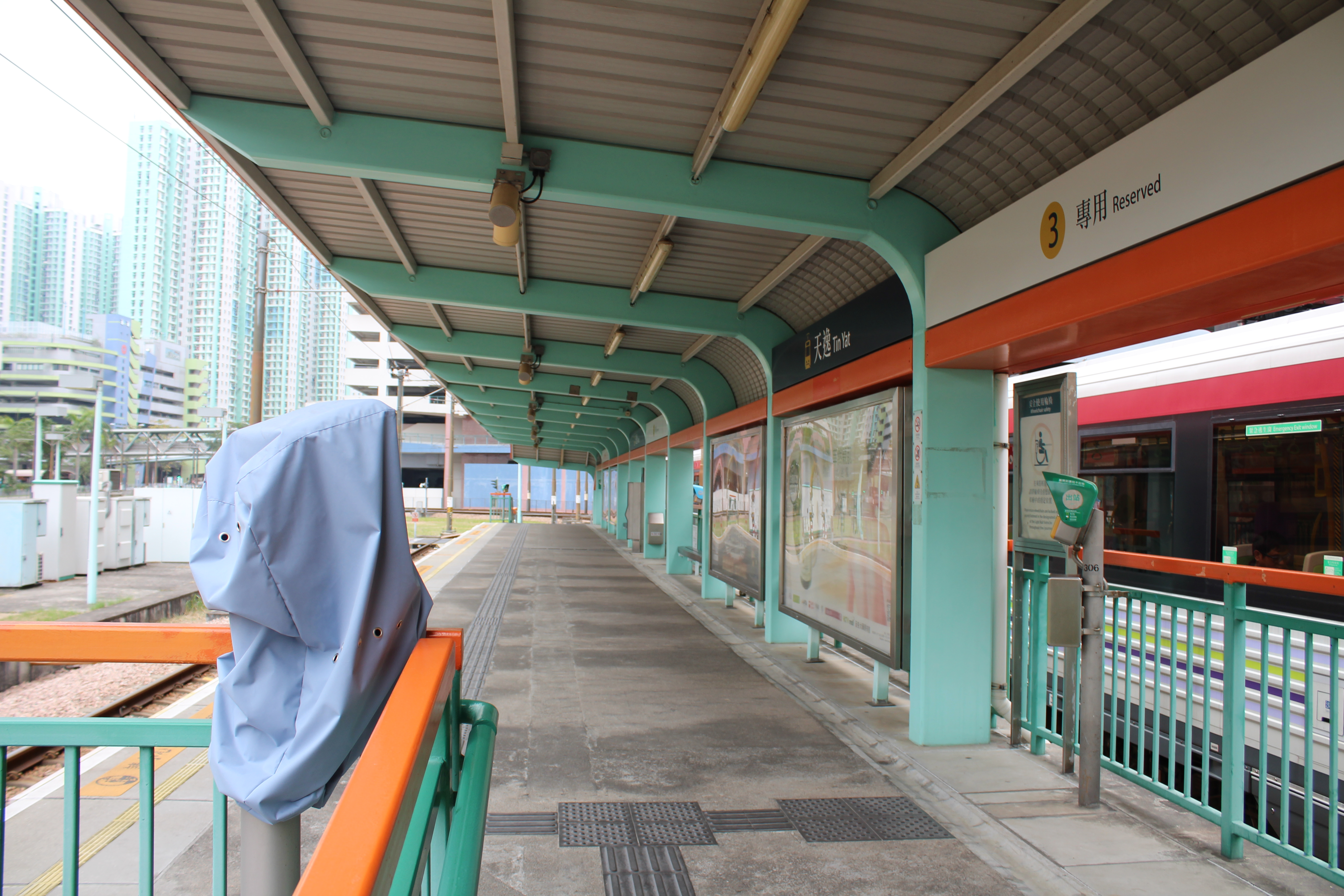 天逸站3號月台